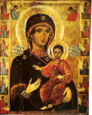 Icône roumain - Monastère de Varatec public domain